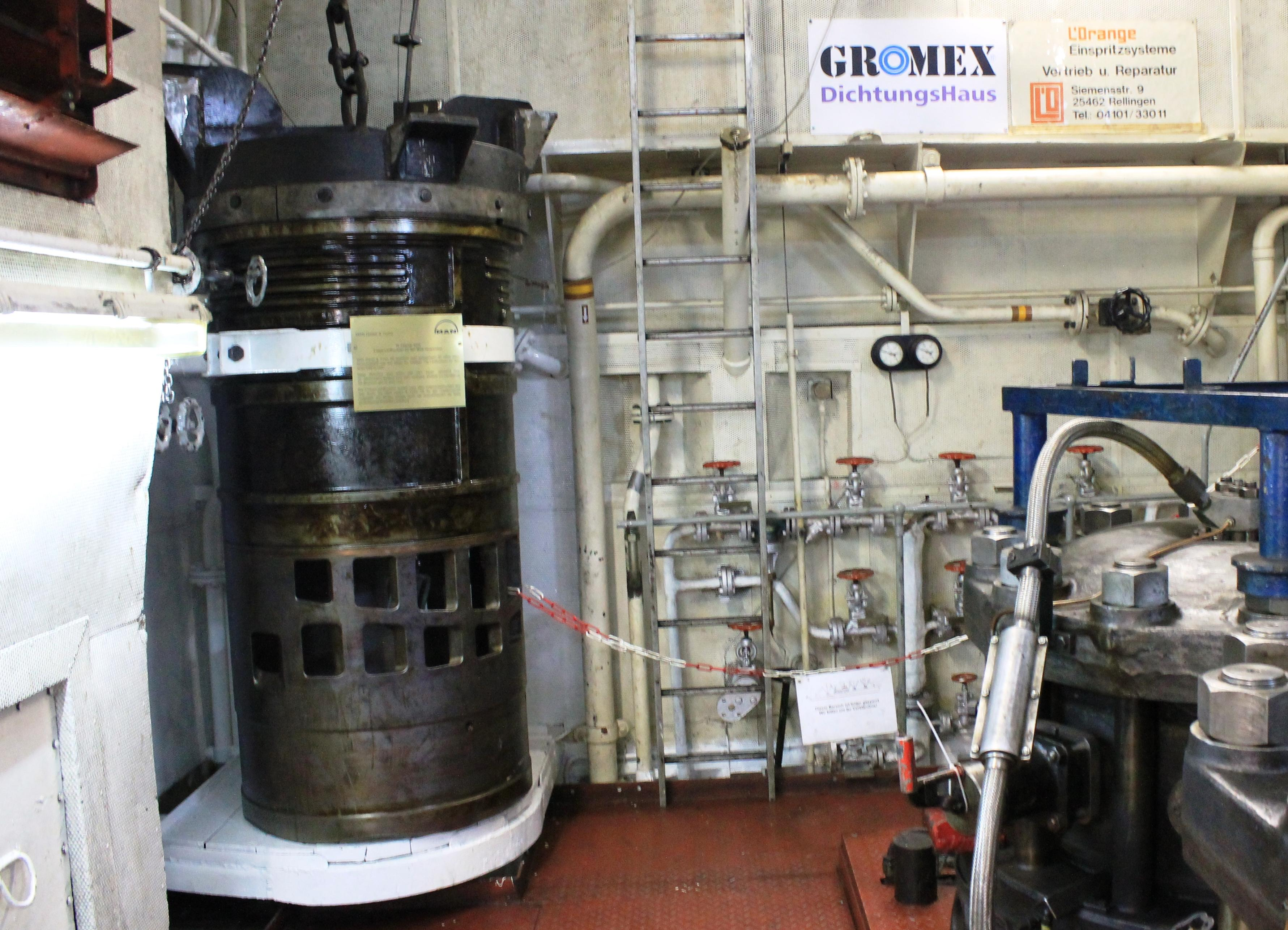 Neue Reservebuchse im Maschinenraum der Cap San Diego